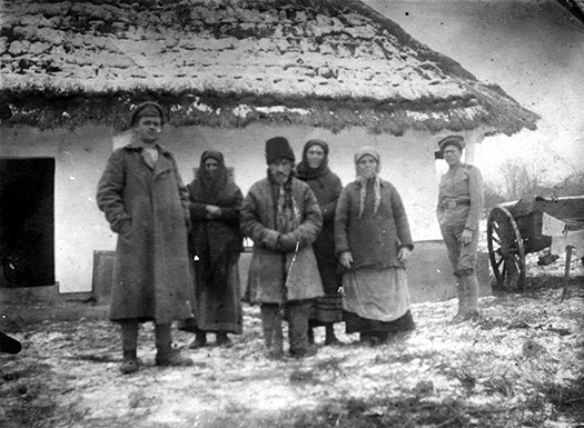 Беларуская (тарашкевіца): Уцекачы зь вёскі Дабучын. Паўднёва-Ўсходняя Ўкраіна, 1918